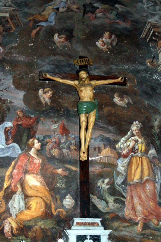 Fresque Lambesc 1750